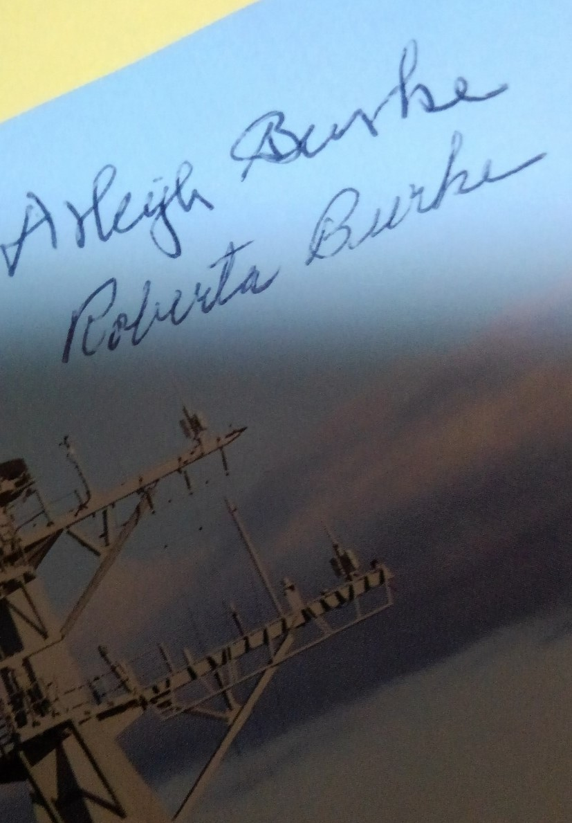 アーレイ・バーク夫妻が、駆逐艦アーレイ・バーク就役記念式典の就役記念プログラムにサインしたもの